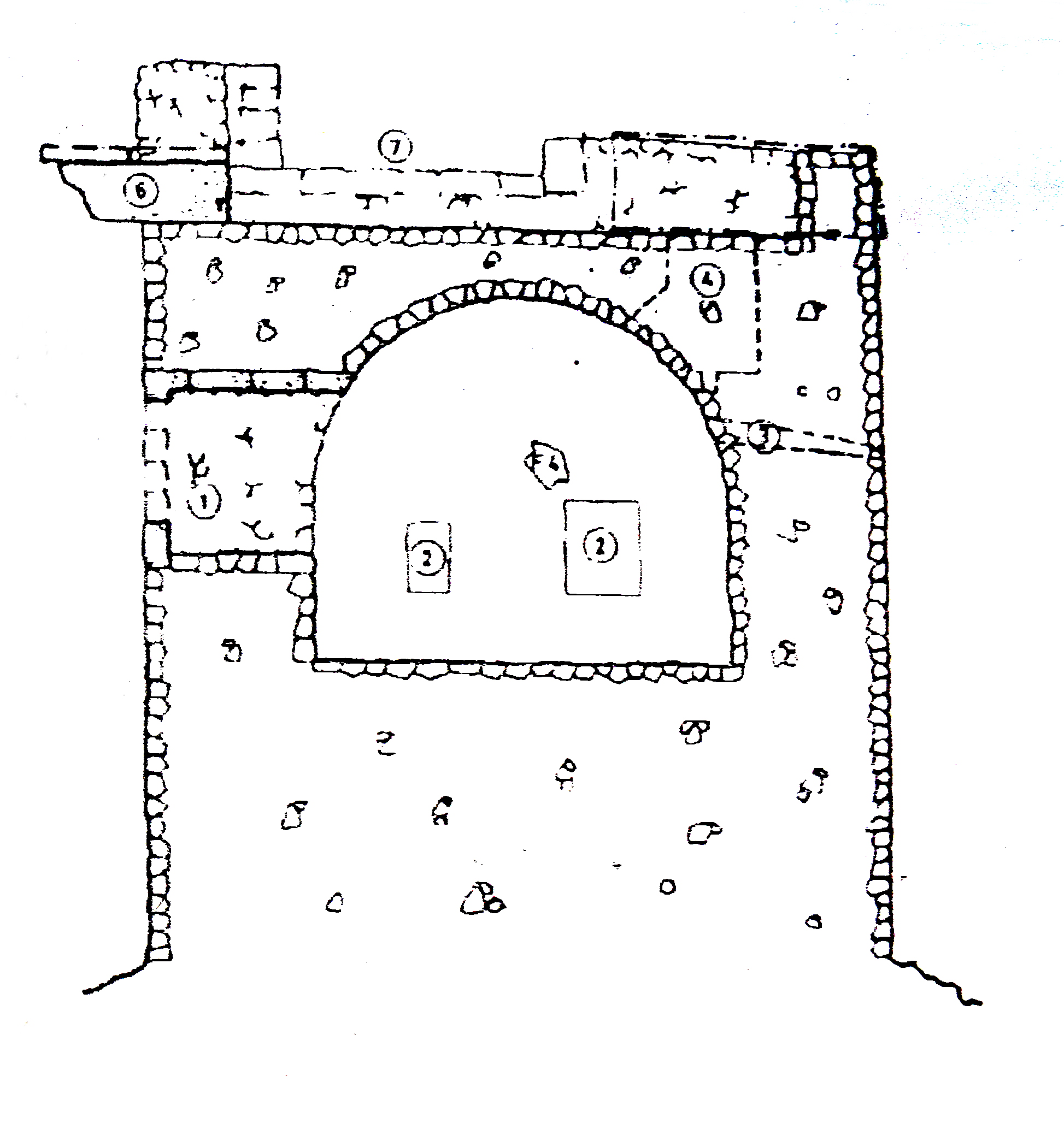 Längsschnitt durch den Torre de Cap Andritxol von der Schautafel am Turm.